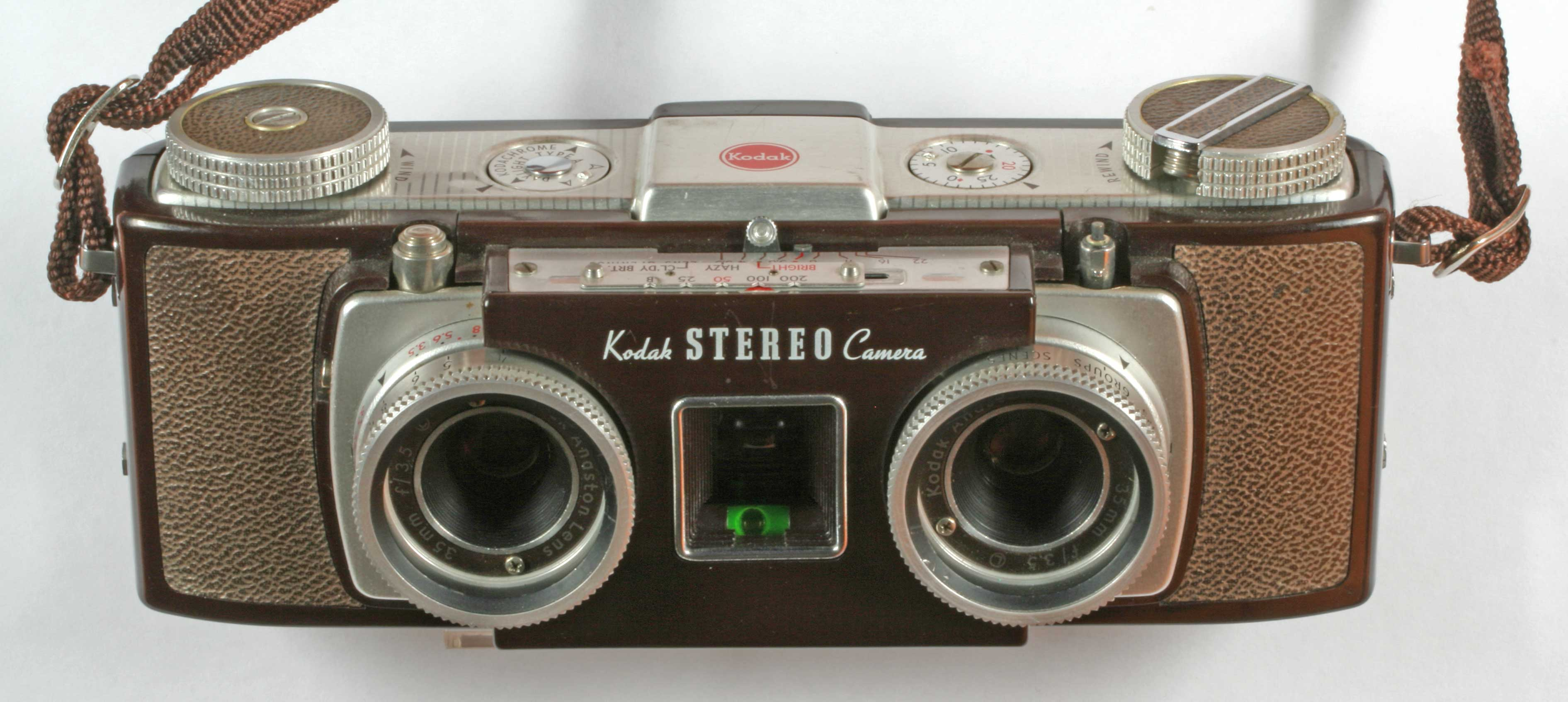 E Kodak Stereo.